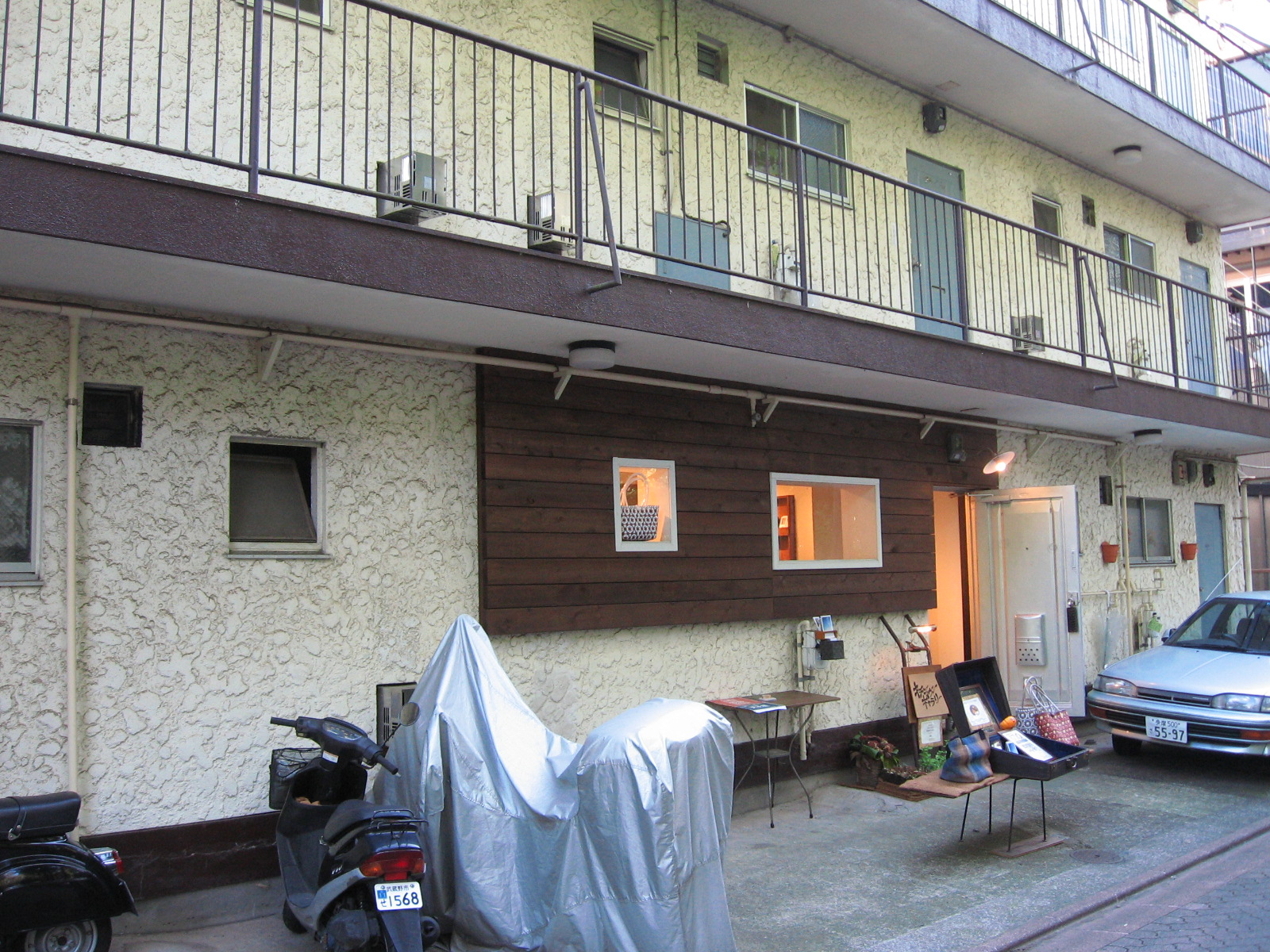 東京都三鷹市井の頭にある貸しギャラリー「キチジョウジギャラリー」のあるアパートの建物。テレビドラマ『GTO』（関西テレビ・フジテレビ系）に登場する「弾間龍二」（城田優）経営のカフェの撮影にも使用された。